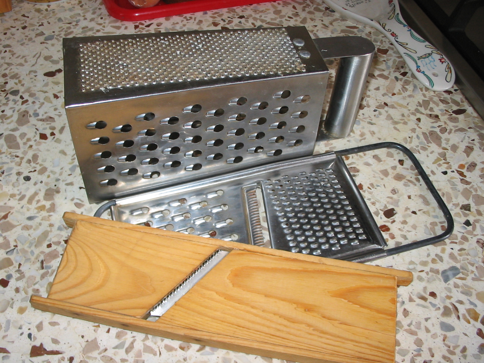 Терка - кухонне приладдя